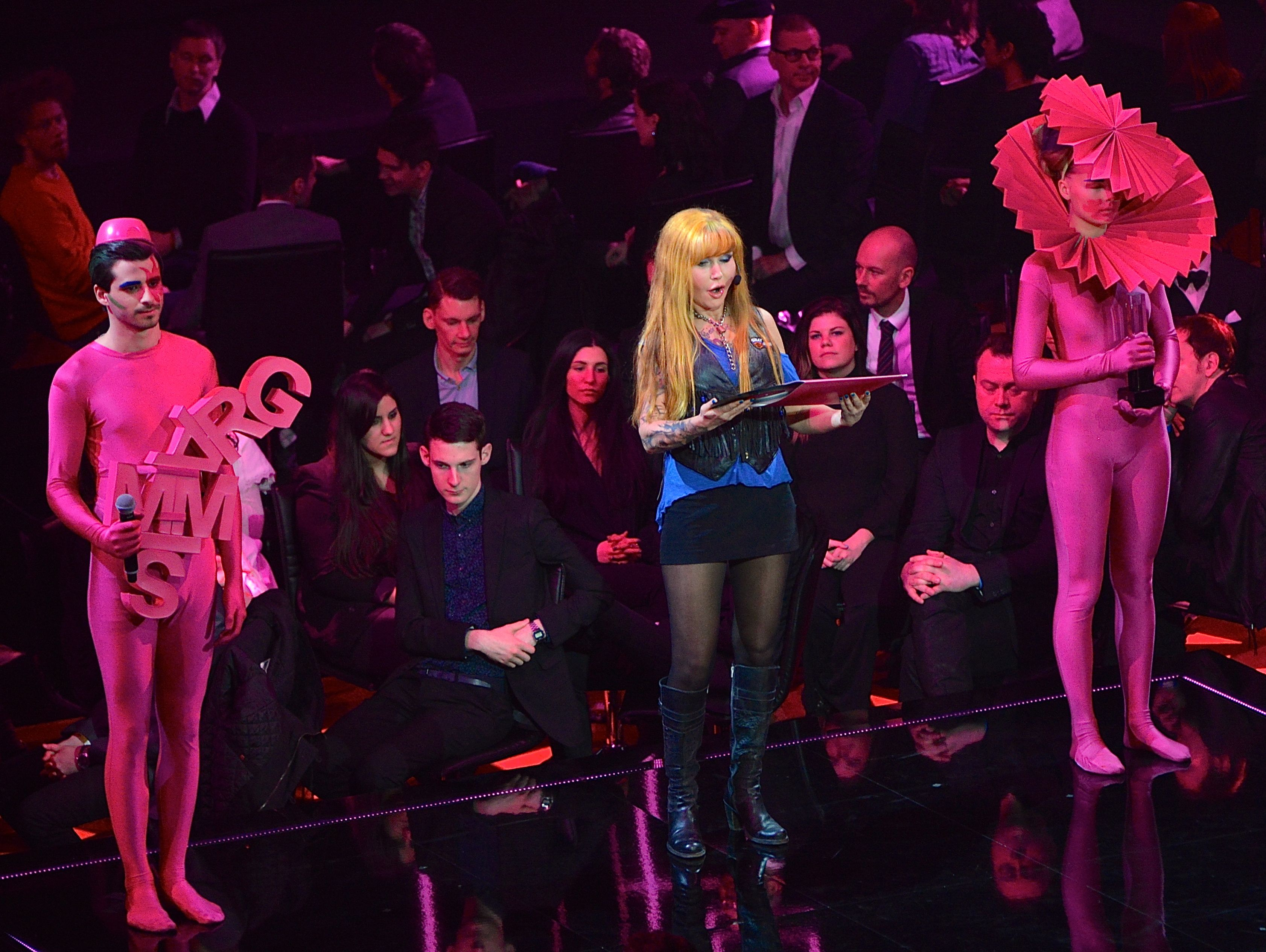 Unni Drougge på Grammisgalan på Cirkus, Stockholm den 20 februari 2013.